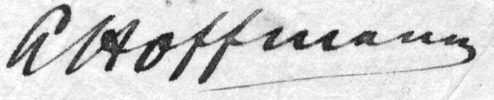 Leberecht Hoffmann (*2. Juli 1863 in Salzuflen; † 20. Oktober 1928 in Bad Salzuflen) war ein lippischer Unternehmer.